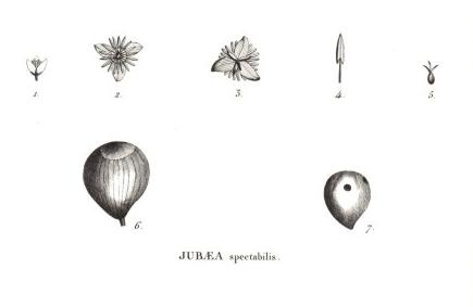 description par Humboldt dans Vogage aux terres equinoxales, 1824